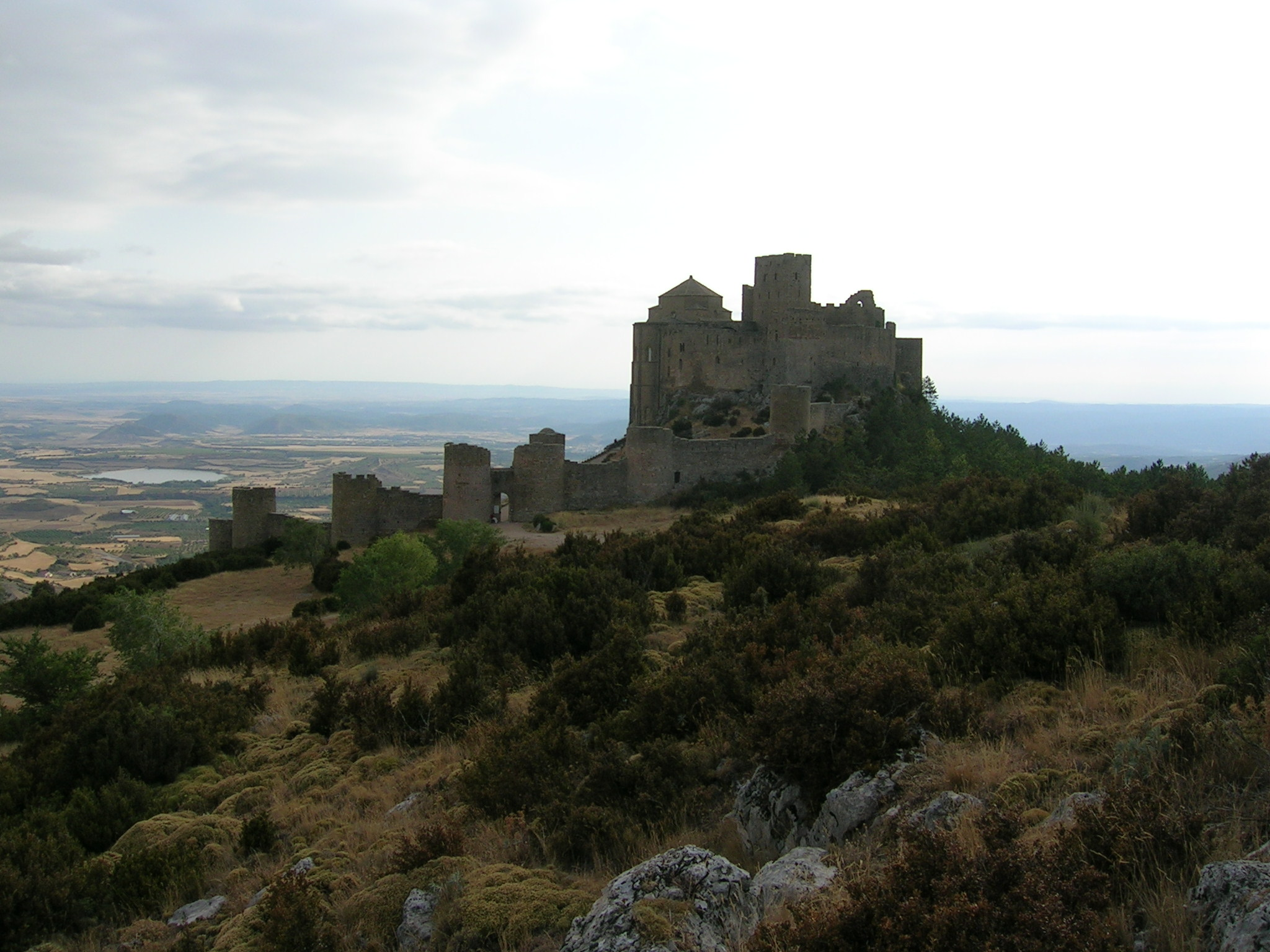 Castelo de Loarre/Castillo de Loarre/Loarre Castle. Foto tomada por Sérgio Gomes.